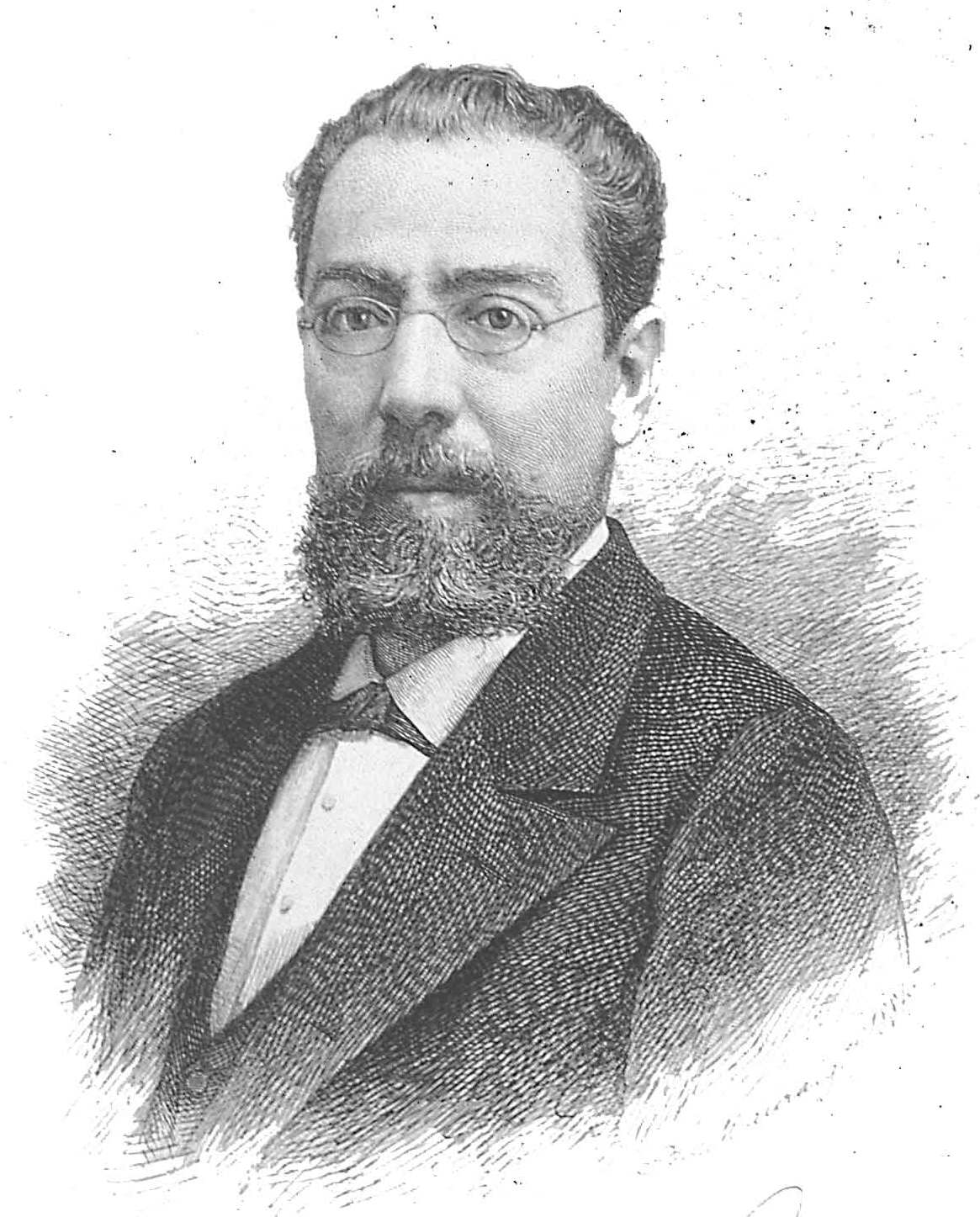 Retrato de Manuel Tamayo y Baus